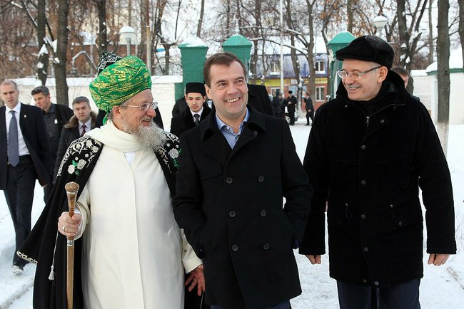 С Президентом Республики Башкортостан Рустэмом Хамитовым (справа) и председателем Центрального духовного управления мусульман, верховным муфтием России Талгатом Таджуддиным.